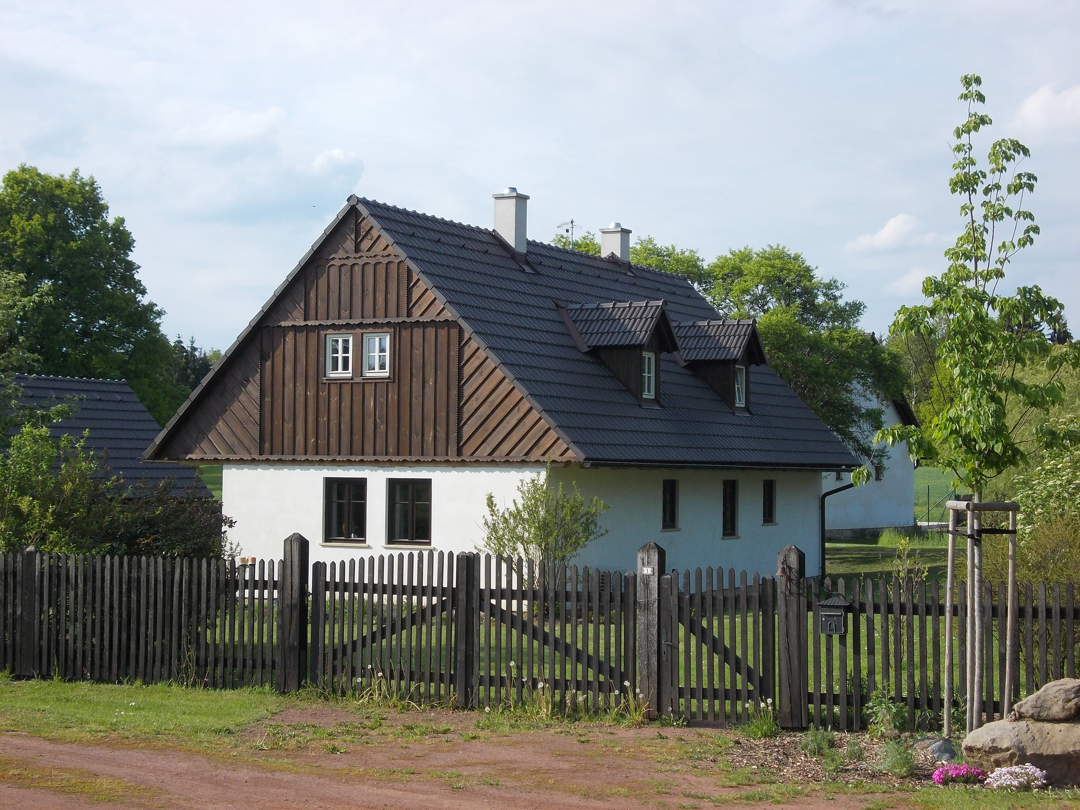 Bacov - č.p. 1